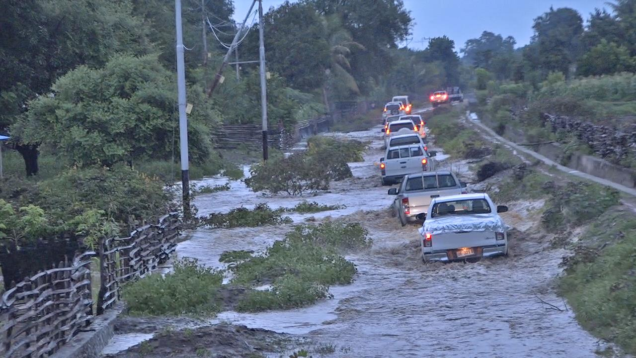 Regenzeit in Oecusse, Osttimor